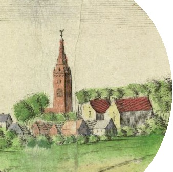 Vrijstaande toren bij de Nicolaïkerk in Appingedam op een uitsnede van de Coenderskaart. De toren werd in 1834 wegens bouwvalligheid gesloopt.